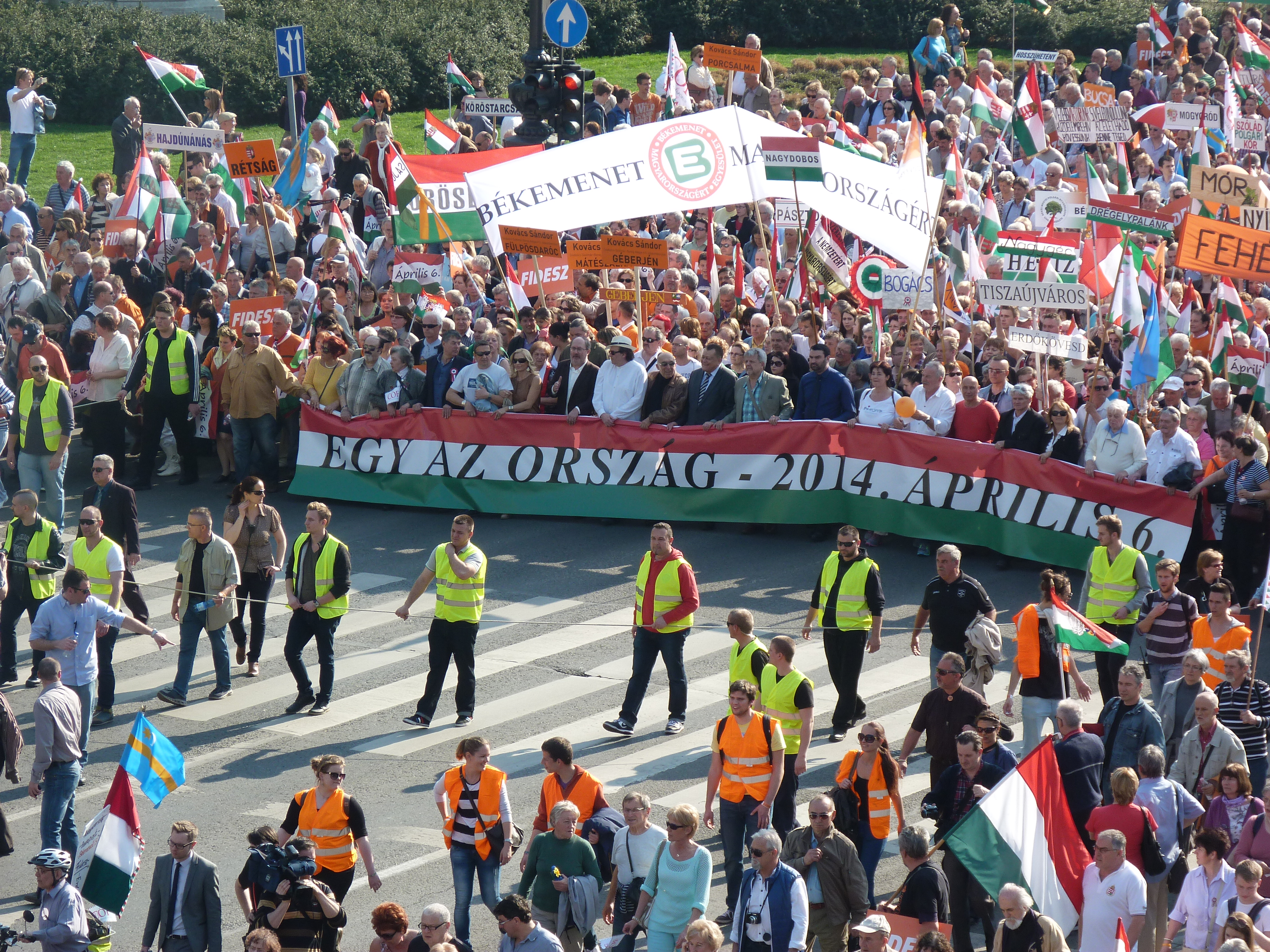 A felvételek 2014. március 29 –én szombaton készültek Budapesten, a Köröndön. A Kossuth térről indult a Békemenet, mely a Köröndön át jutott a Hősök teréig. A Hősök terén Joseph Daul, az Európai Néppárt elnöke, Pásztor István, a Vajdasági Magyar Szövetség elnöke és Orbán Viktor miniszterelnök tartott beszédet. Pozíció: Körönd az Andrássy út 94 szám II. emeleti, az Andrássy úthoz legközelebbi sarokerkélyől, a Hősök terén a FIDESZ Magyar Polgári Párt székhelyének első emeleti, Hősök tér felőli oldalon levő erkélyének Hősök tere felé eső végéről. ©© Derzsi Elekes Andor, Budapest, 2014, A kép és filmfelvételek egészben, vagy részletekben másolását, bármilyen úton történő sokszorosítását és felhasználását a szerző ellenérték nélkül, jogutódjaira is kihatóan megengedi. Az engedély kiterjed a kereskedelmi célú hasznosításra is. Kéri azonban nevének feltüntetését a felhasználás során. A Metapolisz sorozat valamennyi képe és filmje Creative Commons alatti valamint kereskedelmi - for profit - célra is felhasználható. Ajánlott hivatkozás: Derzsi Elekes Andor: Metapolisz DVD line